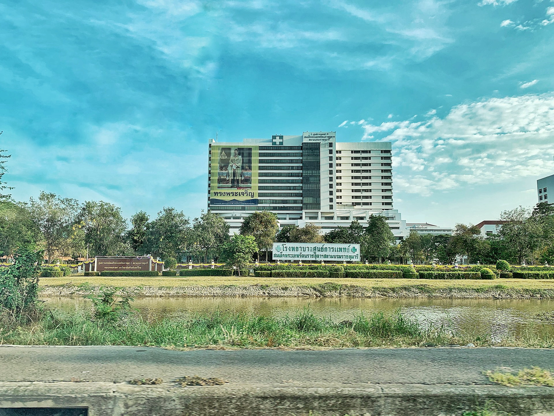 โรงพยาบาล ศูนย์การแพทย์ สมเด็จพระเทพฯ มศว องครักษ์